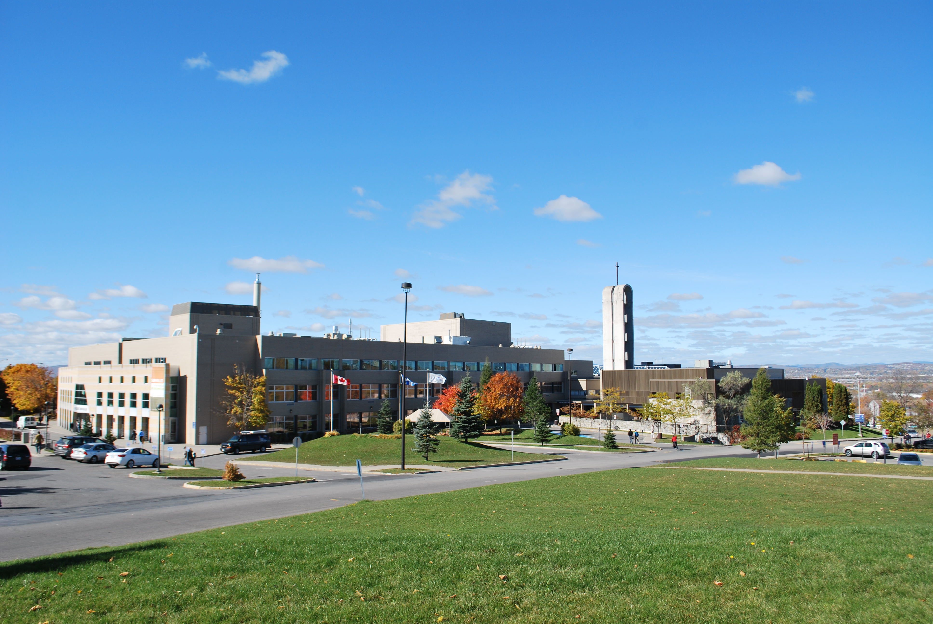 Campus du Cégep de Sainte-Foy, à Québec (Canada).